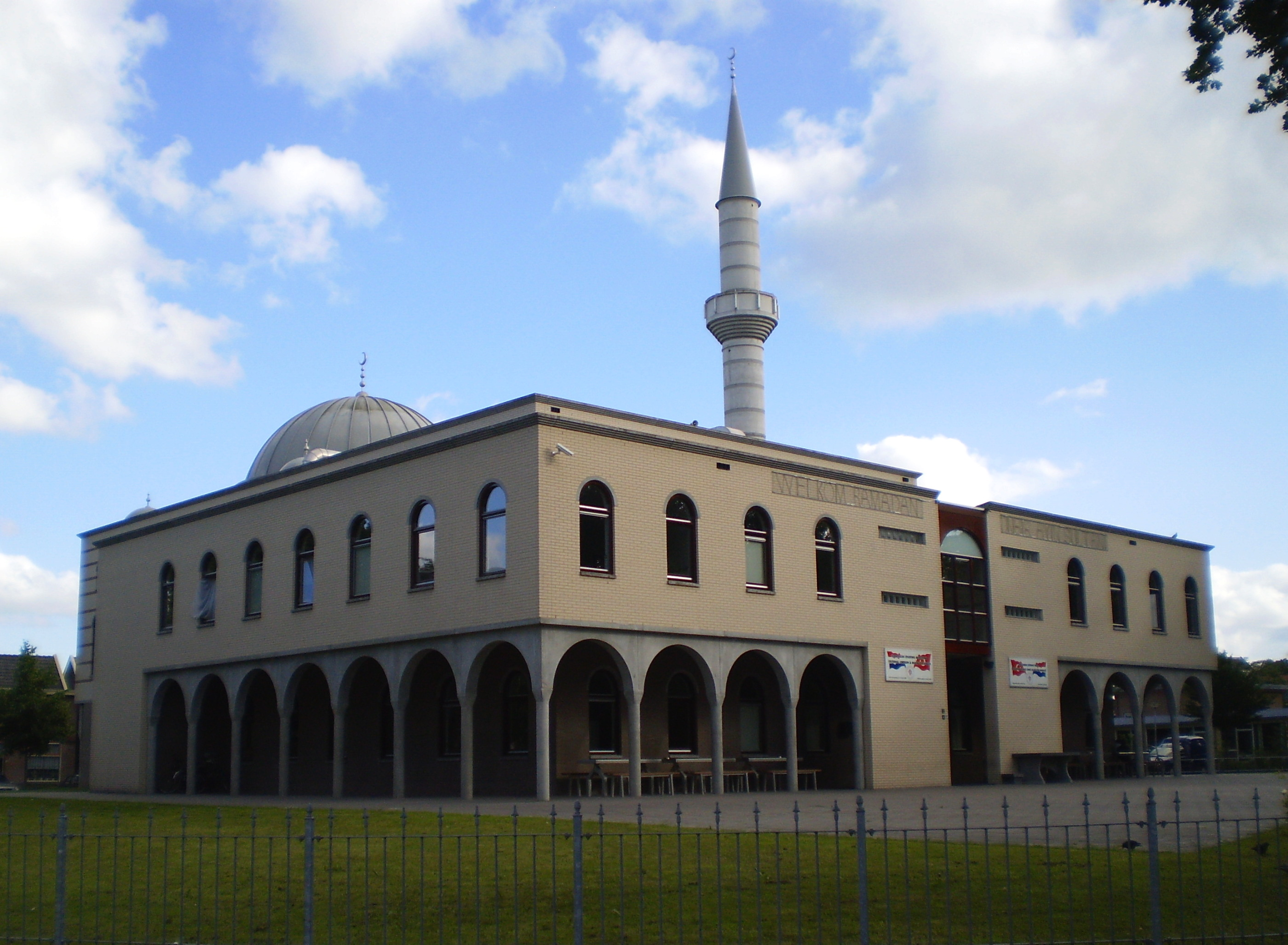 Merkez Moskee/Deventer Merkez Camii (Turks), Smyrnadwarsstraat Deventer, bouwjaar 2003